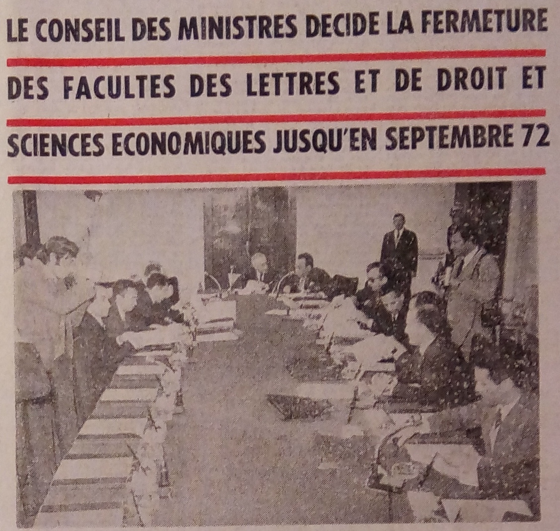 La presse 9 fev 1972